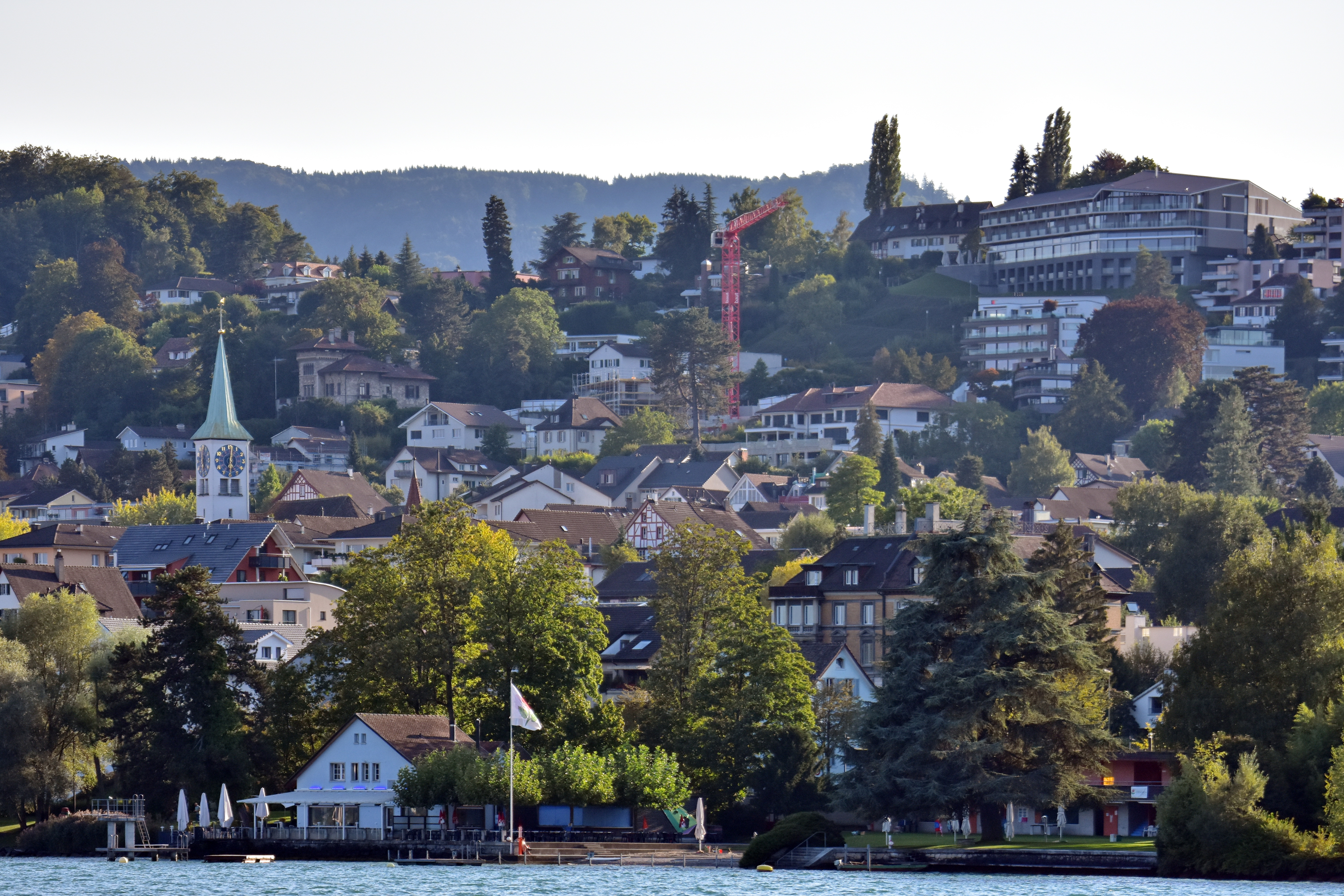 Rüschlikon as seen from ZSG ship MS Helvetia on Zürichsee in Switzerland